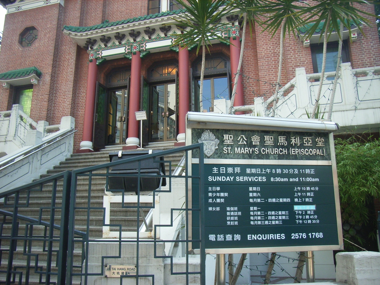 大坑道 User:Sun Victoria